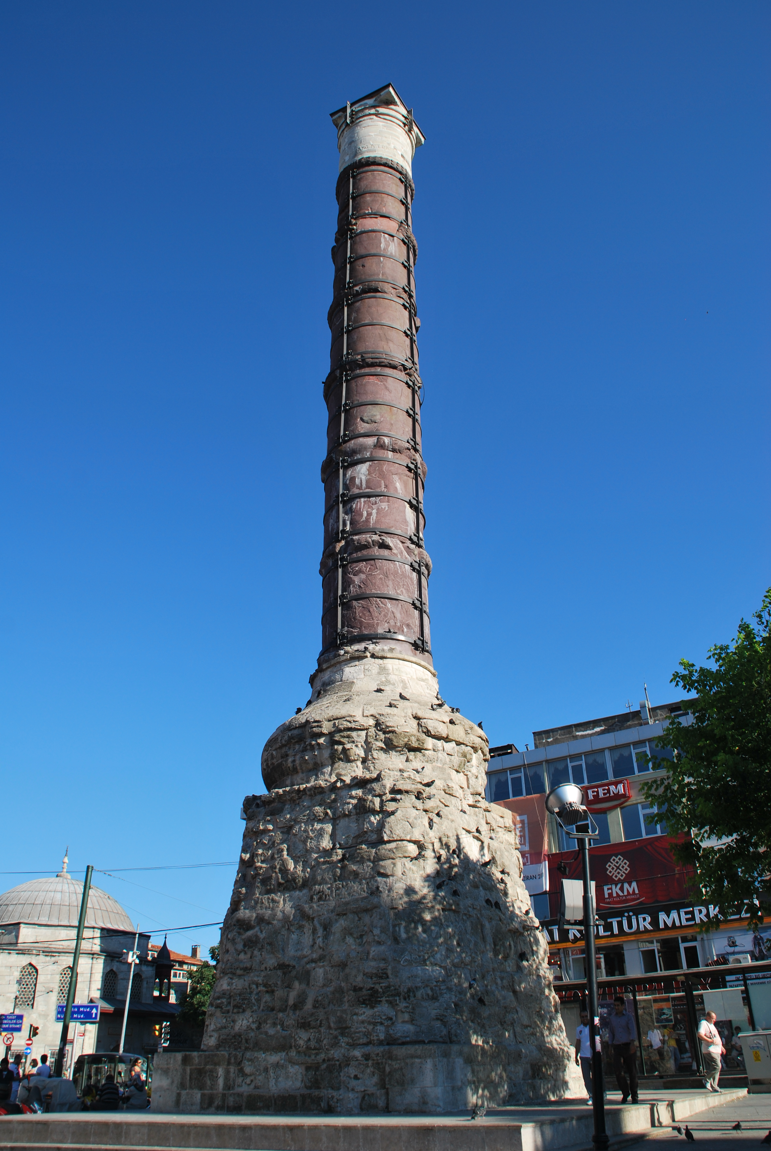 Çemberlitaş